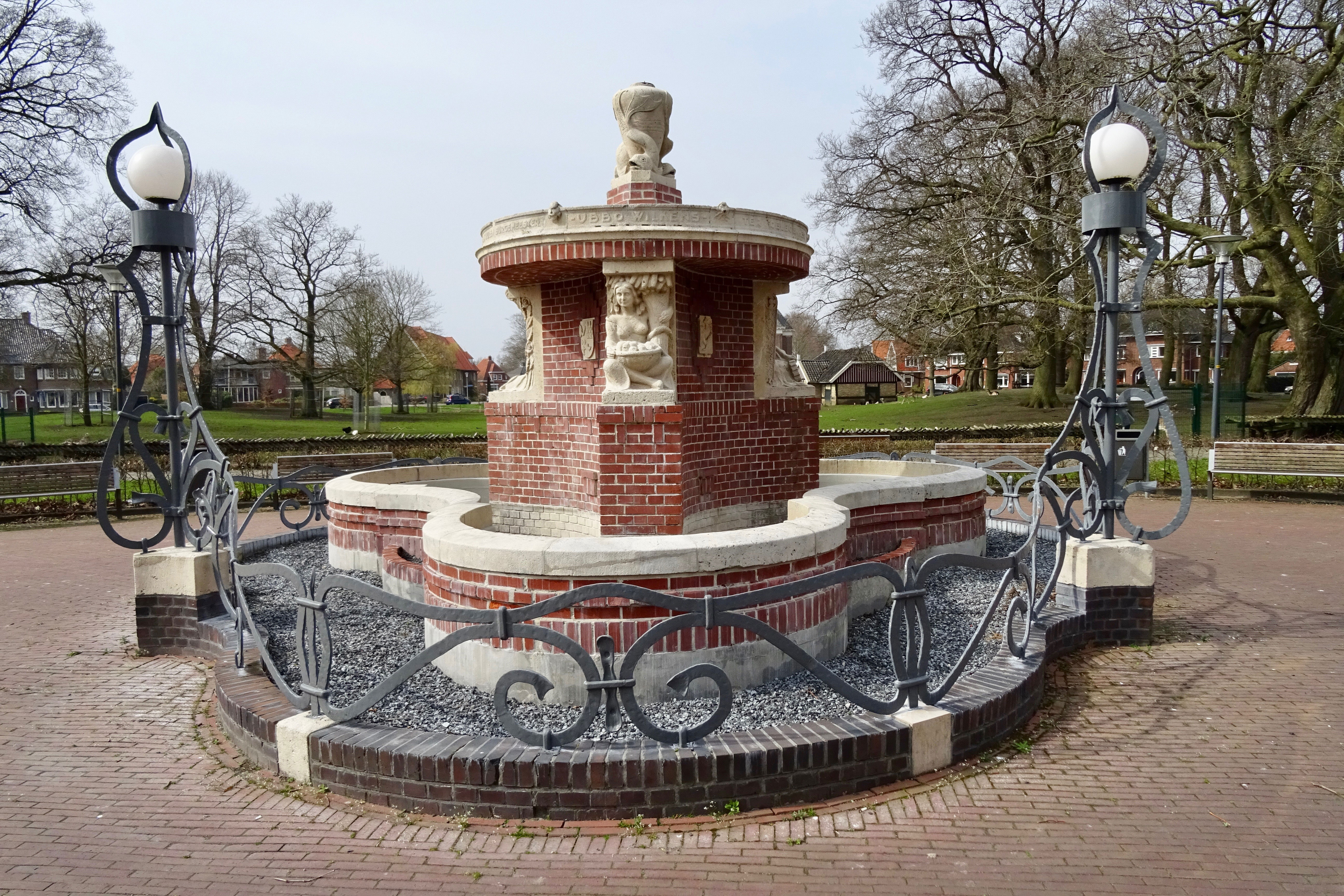 Wilkensfontein, gerealiseerd uit een legaat van burgemeester Ubbo Wilkens ter ere van het feit dat Veendam werd aangesloten op het provinciale waterleidingnet, de fontein is ontworpen door C.L. Huguenoth van der Linden en het beeldhouwwerk is van G. Marree